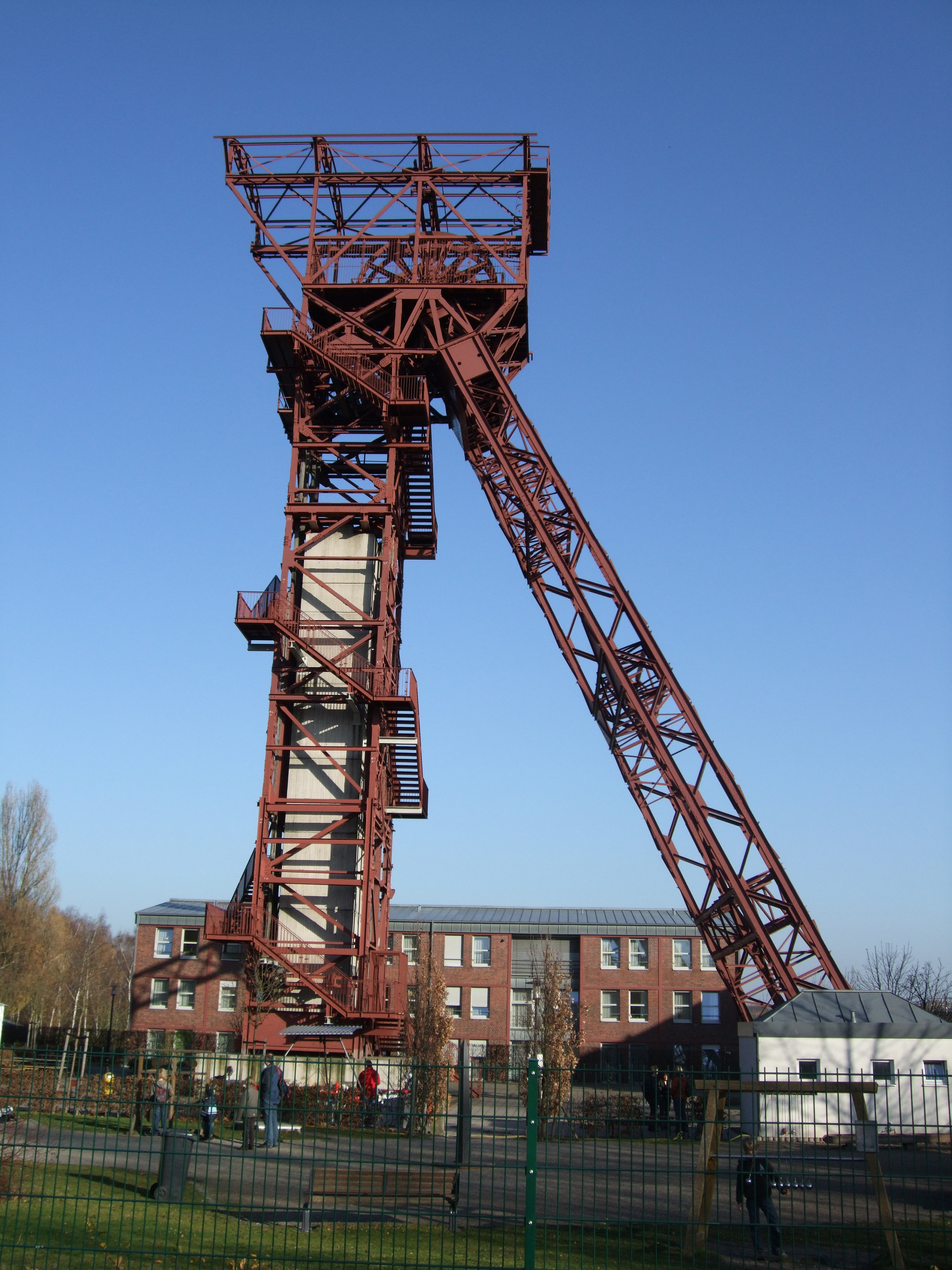 Zeche Zollverein Schacht 3/7/10, Essen, Germany, Förderturm Schacht 10